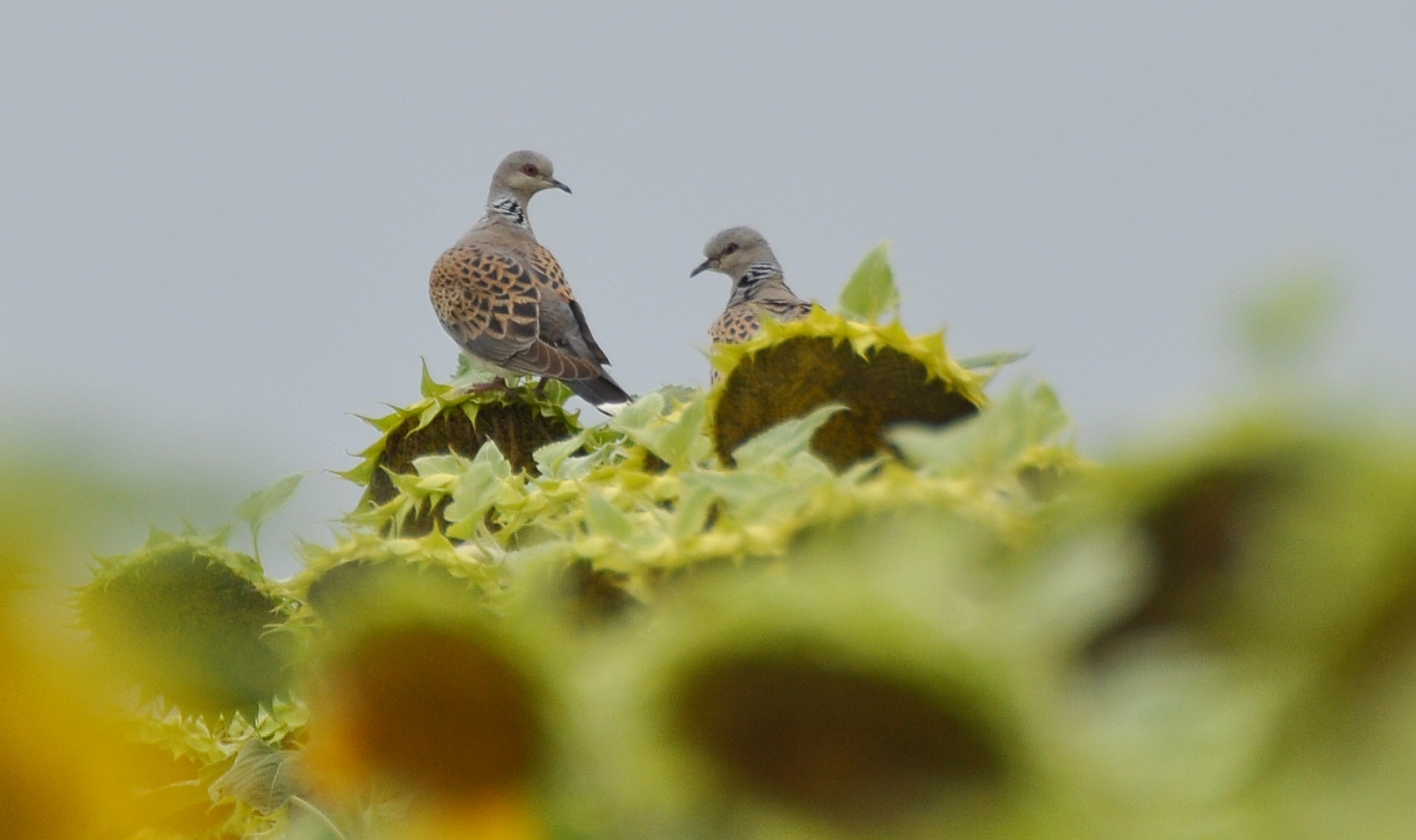 Tourterelle des bois - Le Champ St Père -Vendée - 14 août 2019